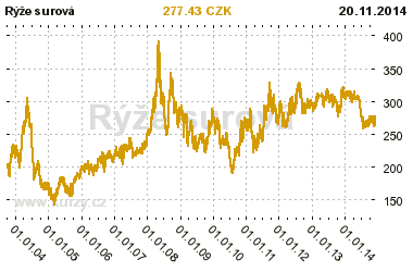 Rýže - Cena komodity.